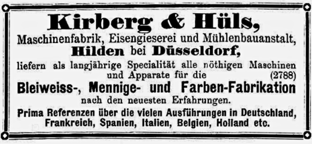 Anzeige der Maschinenfabrik Kirberg & Hüls, früher Hilden, Schwanenstraße 28, in Chemiker-Zeitung Nr. 52 vom 30. Juni 1886